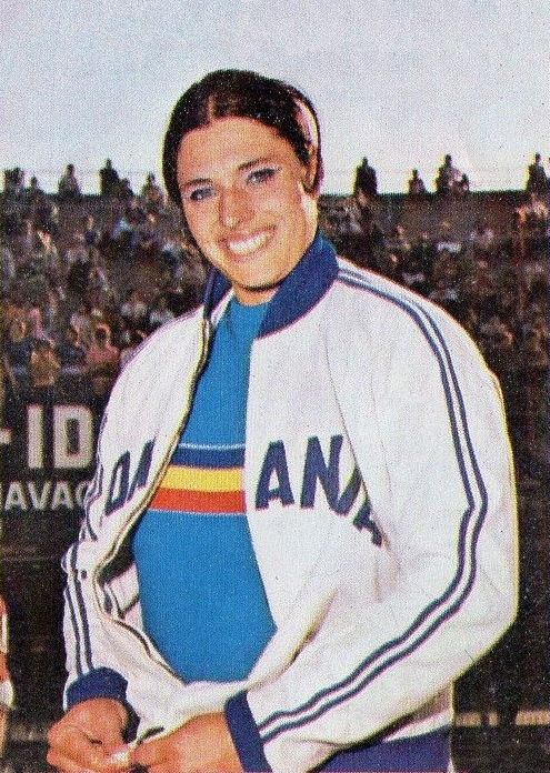 CAMPIONI dello SPORT 1973/74-Figurina n.56- MENIS - ROMANIA -ATL.LEGGERA